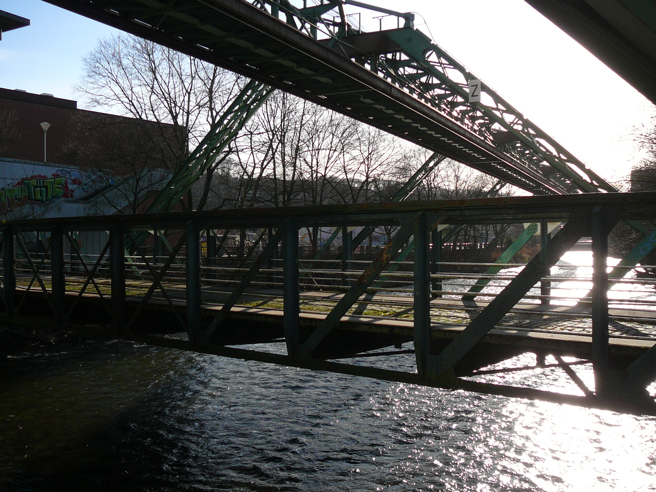 Friedrich-Ebert-Str., Wuppertal